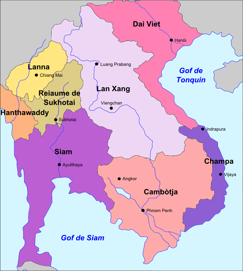 L'Asia dau Sud-Èst en 1400.